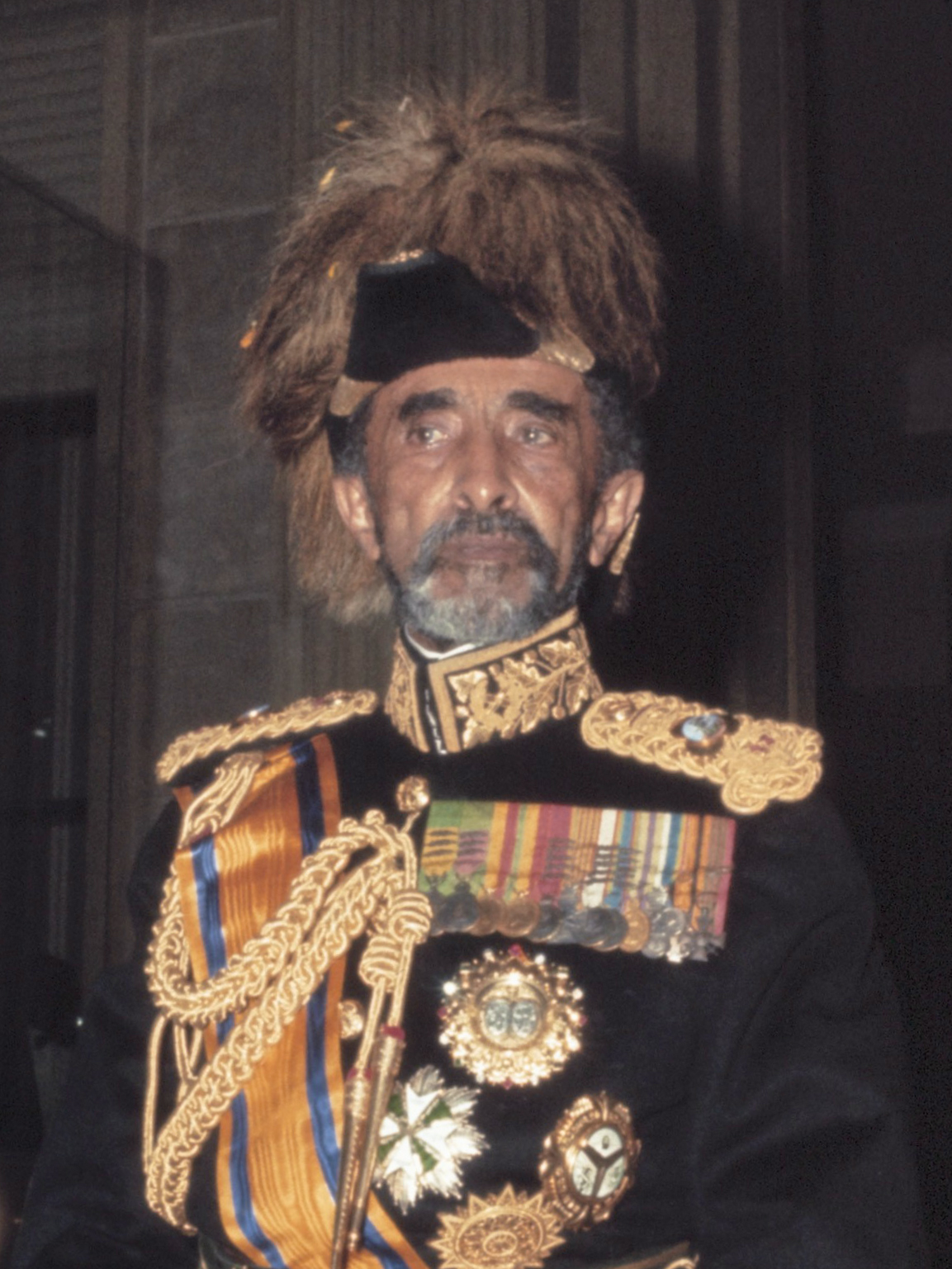 Haile Selassie tijdens staatsbezoek koningin Juliana aan Ethiopië. *januari 1969